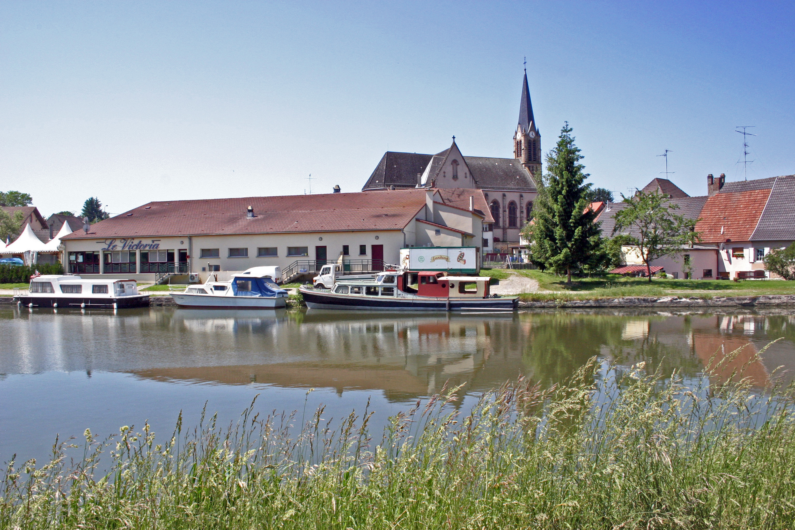 Wittring